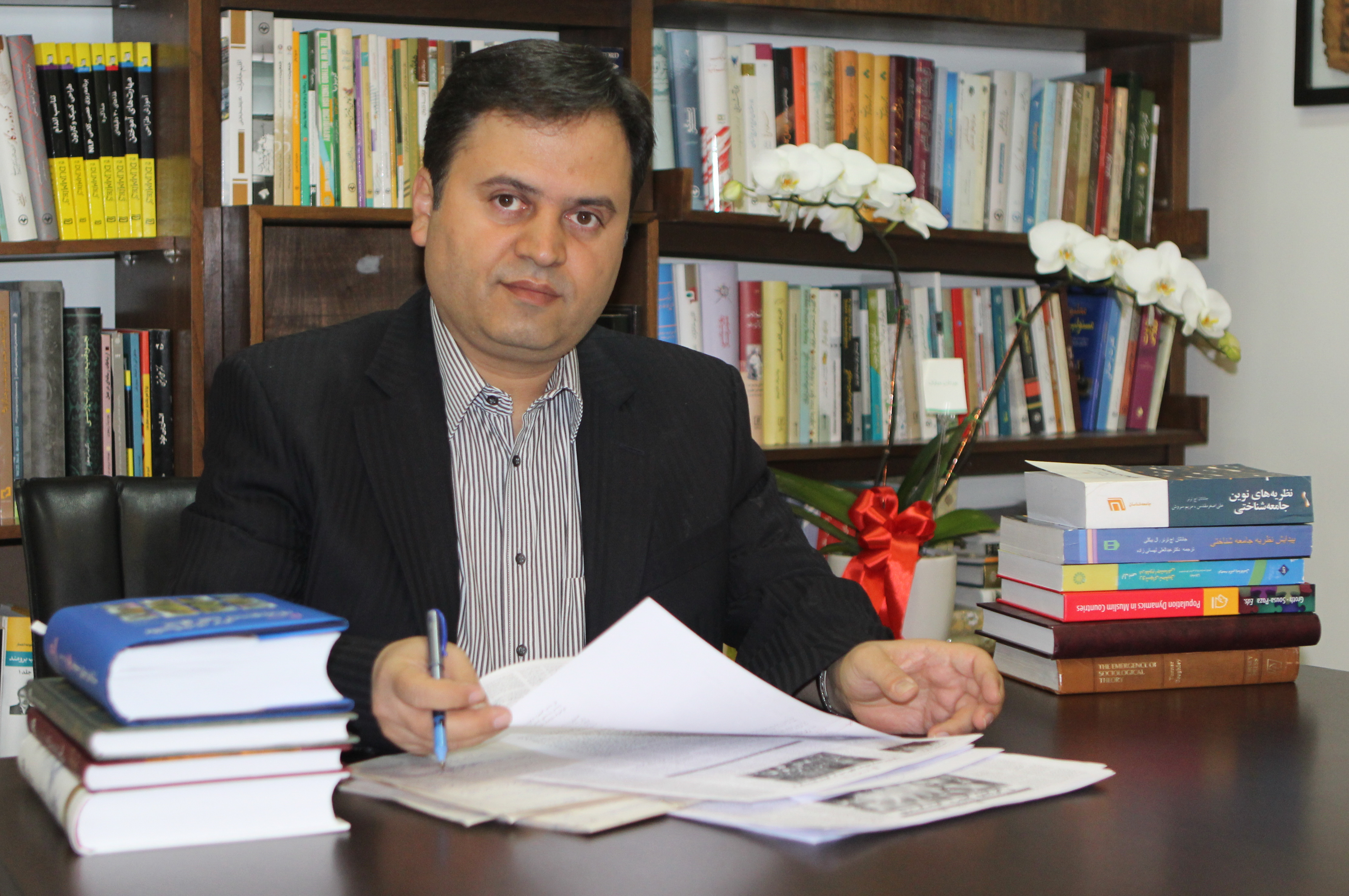 the chief editor of Ettelaat newspaper (the most famous and the oldest newspaper of Iran)